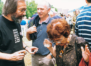 Tamás Gáspár Miklós, Bolgár György és Heller Ágnes beszélgetnek a kertben - Szárszói Találkozó 1999